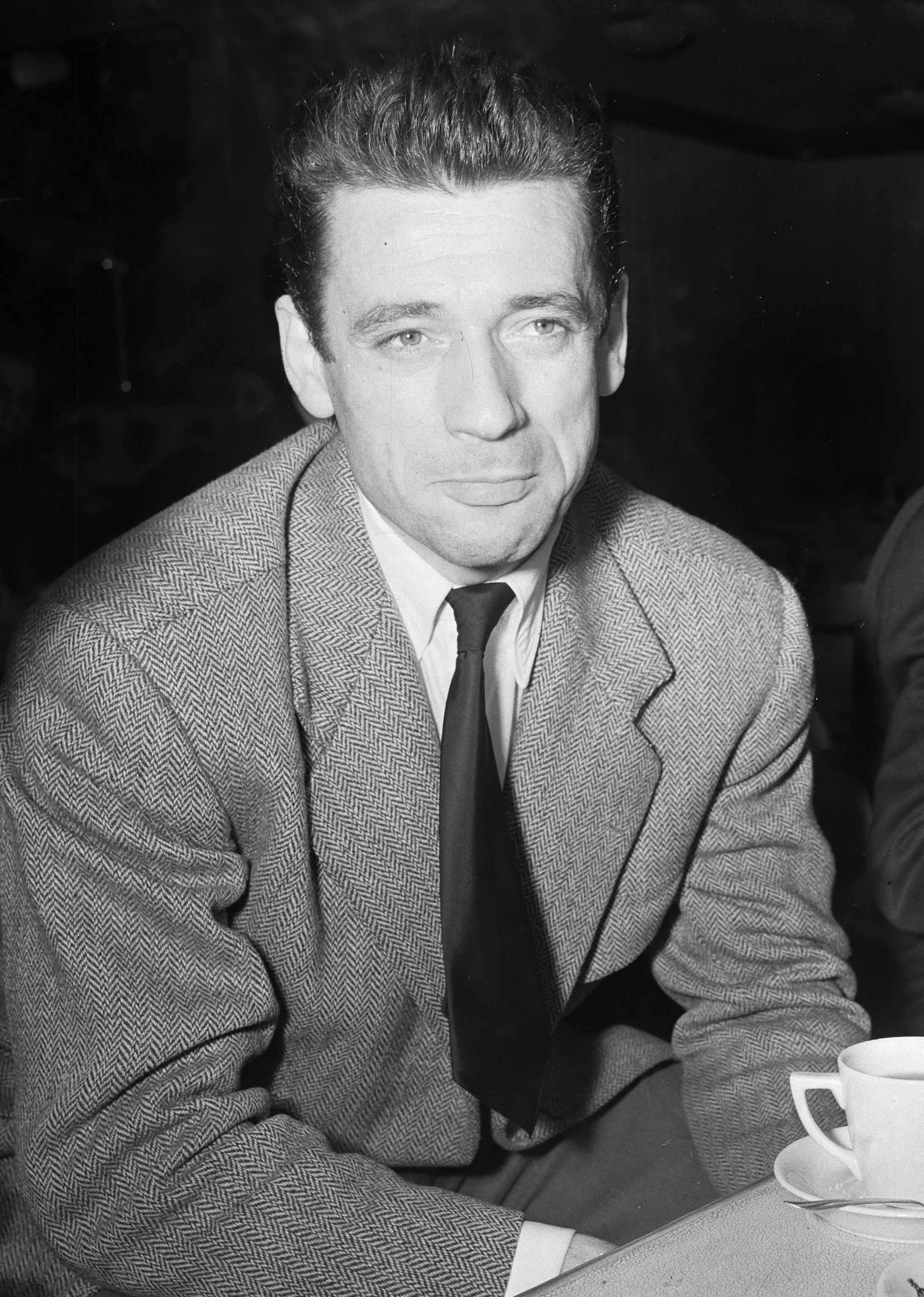 Yves Montand bezoekt Nederland